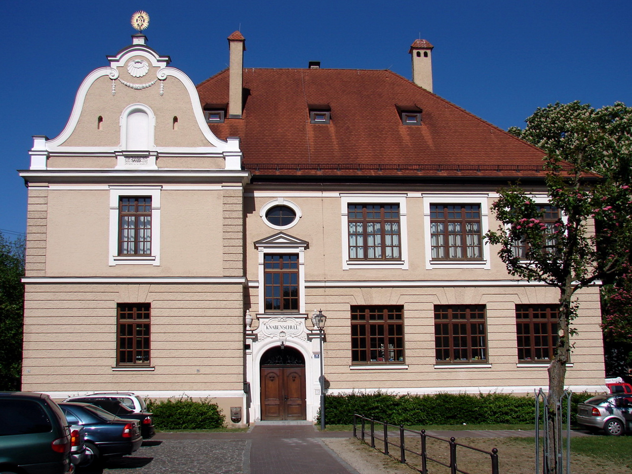 Schulhaus, barockisierender Walmdachbau mit Blendgiebel